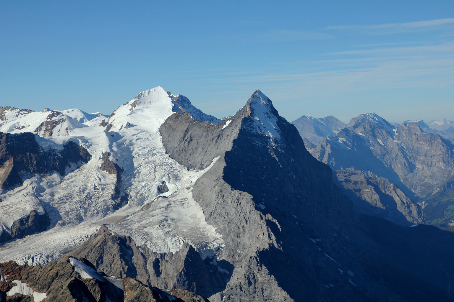 Blick vom Wetterhorn nach Südwesten auf den Eiger (3970 m) mit dem Mittellegigrat und den Mönch (4107 m). Davor befindet sich der Untere Grindelwaldgletscher.